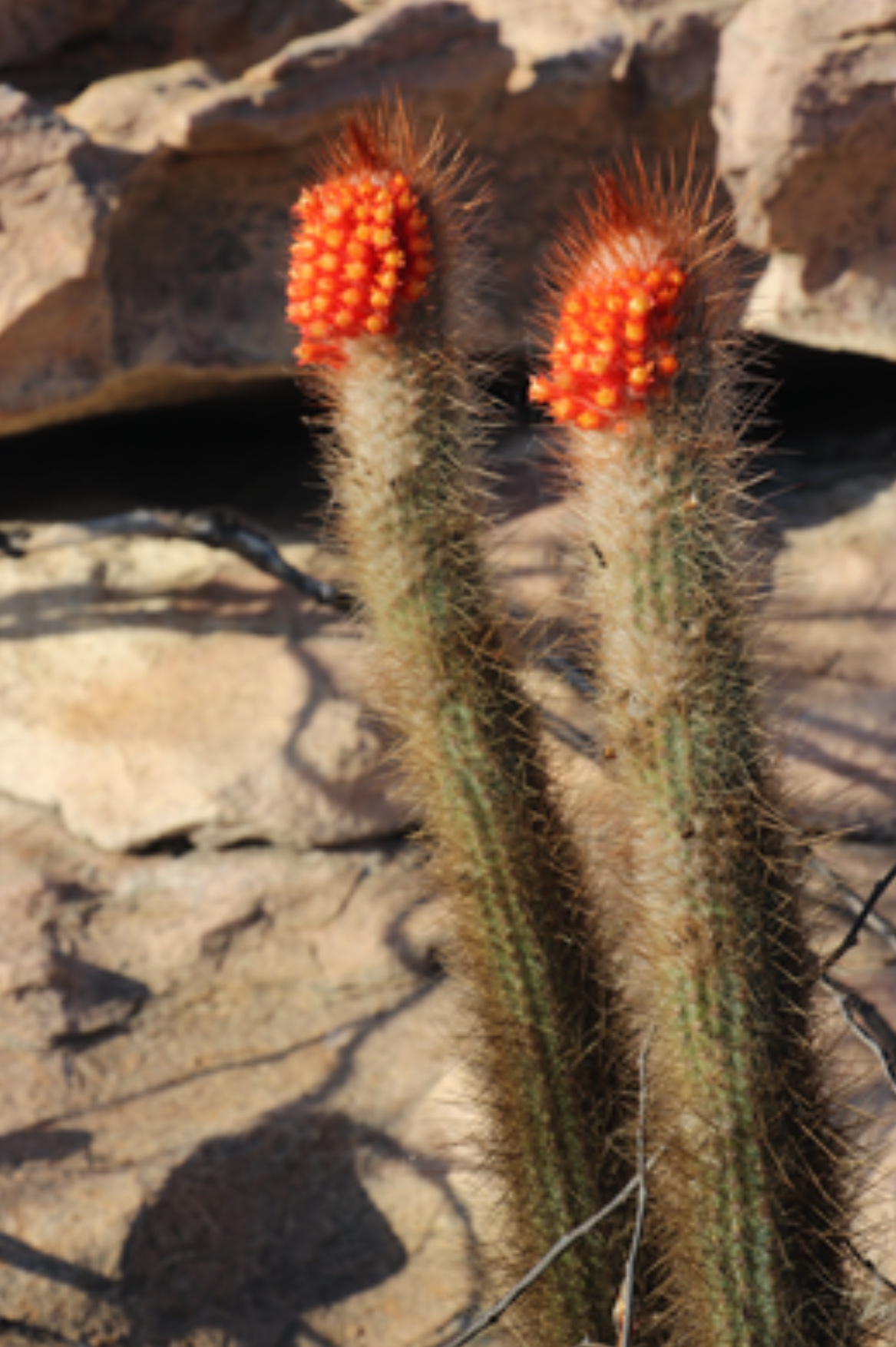 Micranthocereus flaviflorus ssp. densiflorus Bahia Brasil